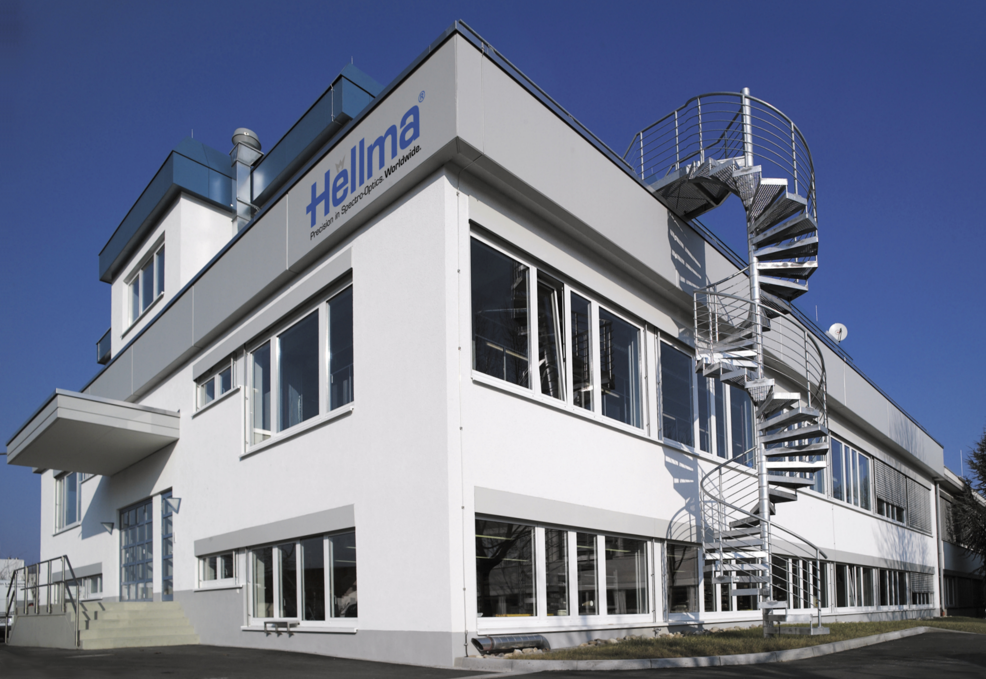 Der Sitz der Hellma Firmengruppe in Müllheim